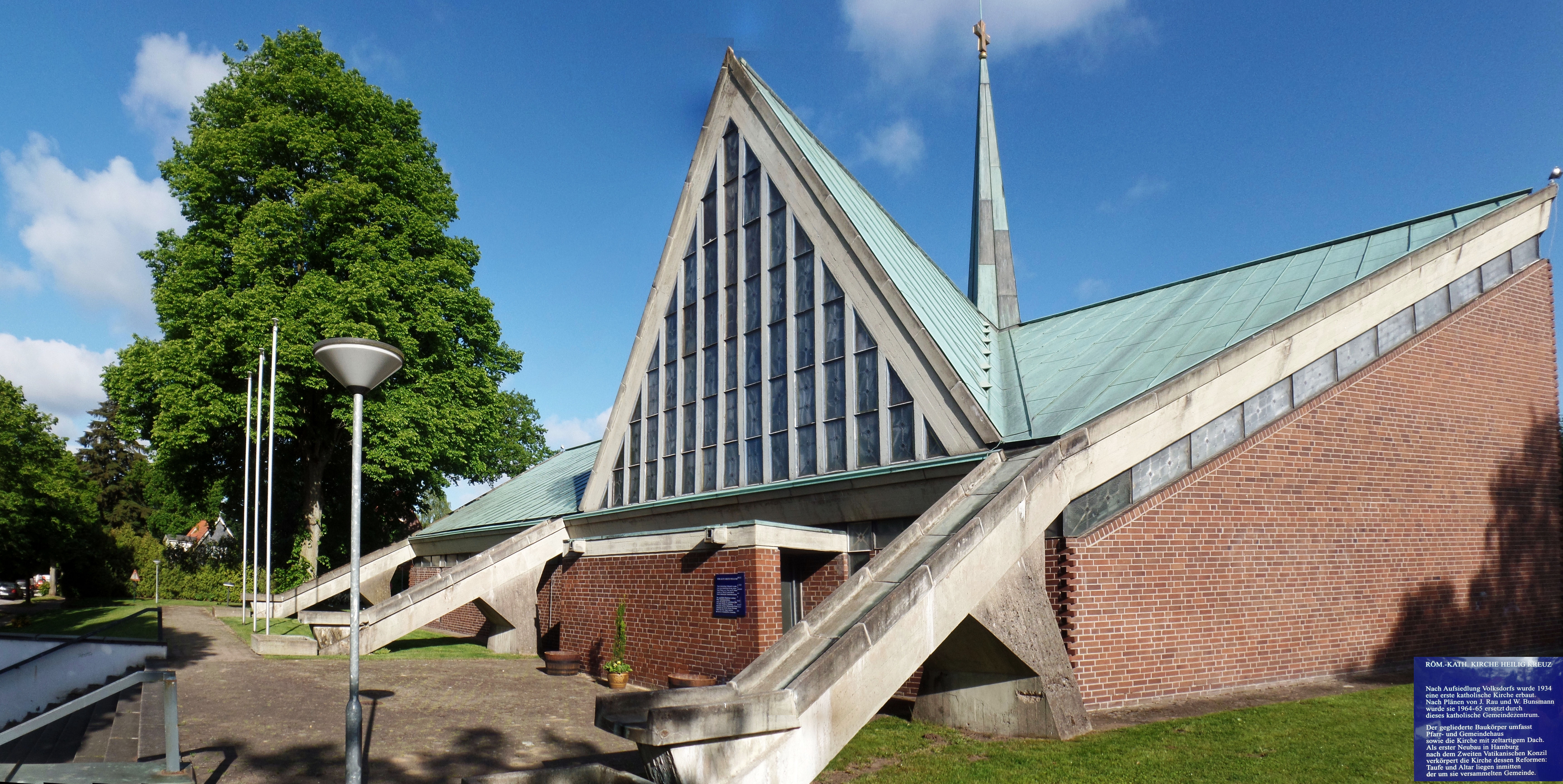 Röm.-Kath.Kirche Heilig Kreuz(Straßenseite)